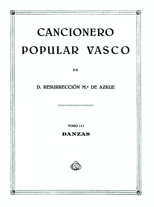 R. M. Azkuek idatzia. Ahozko tradizioko kanta gehien jaso dituen lana da.